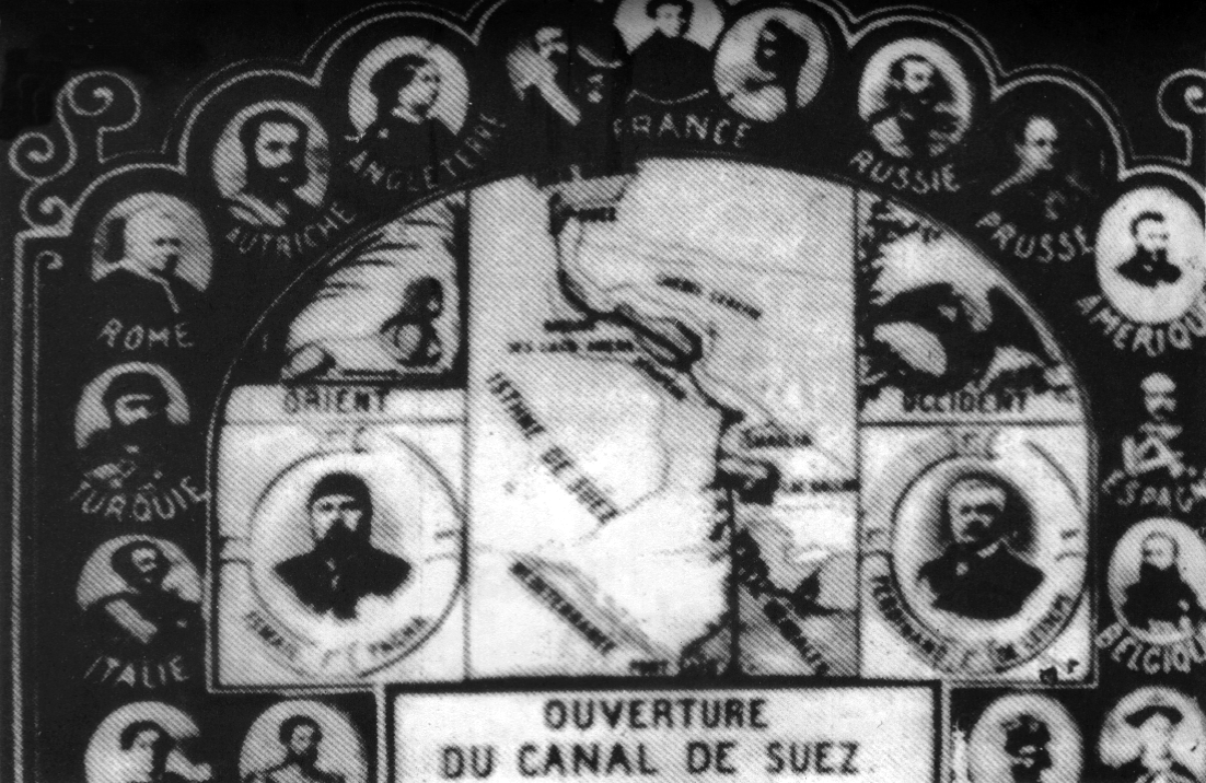 دعوة الخديو إسماعيل إلى ملوك وأمراء أوربا لحضور حفل افتتاح قناة السويس